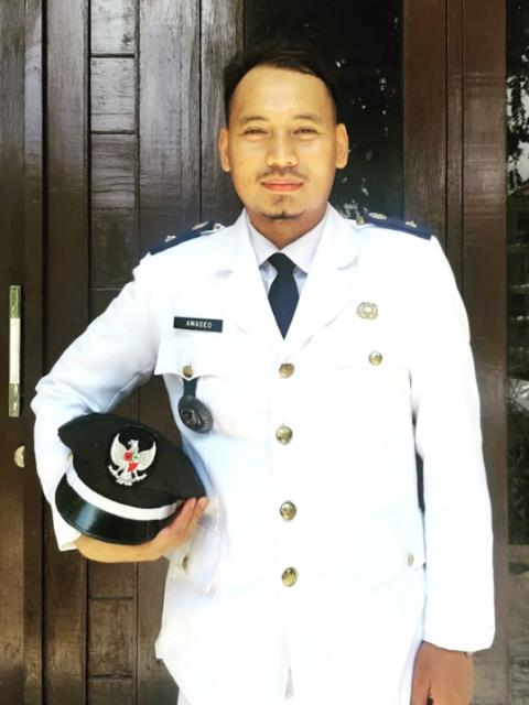 Amadeo, S.T. setelah dilantik sebagai Lurah Utan Panjang, Kemayoran, Jakarta Pusat pada 14 Januari 2020.